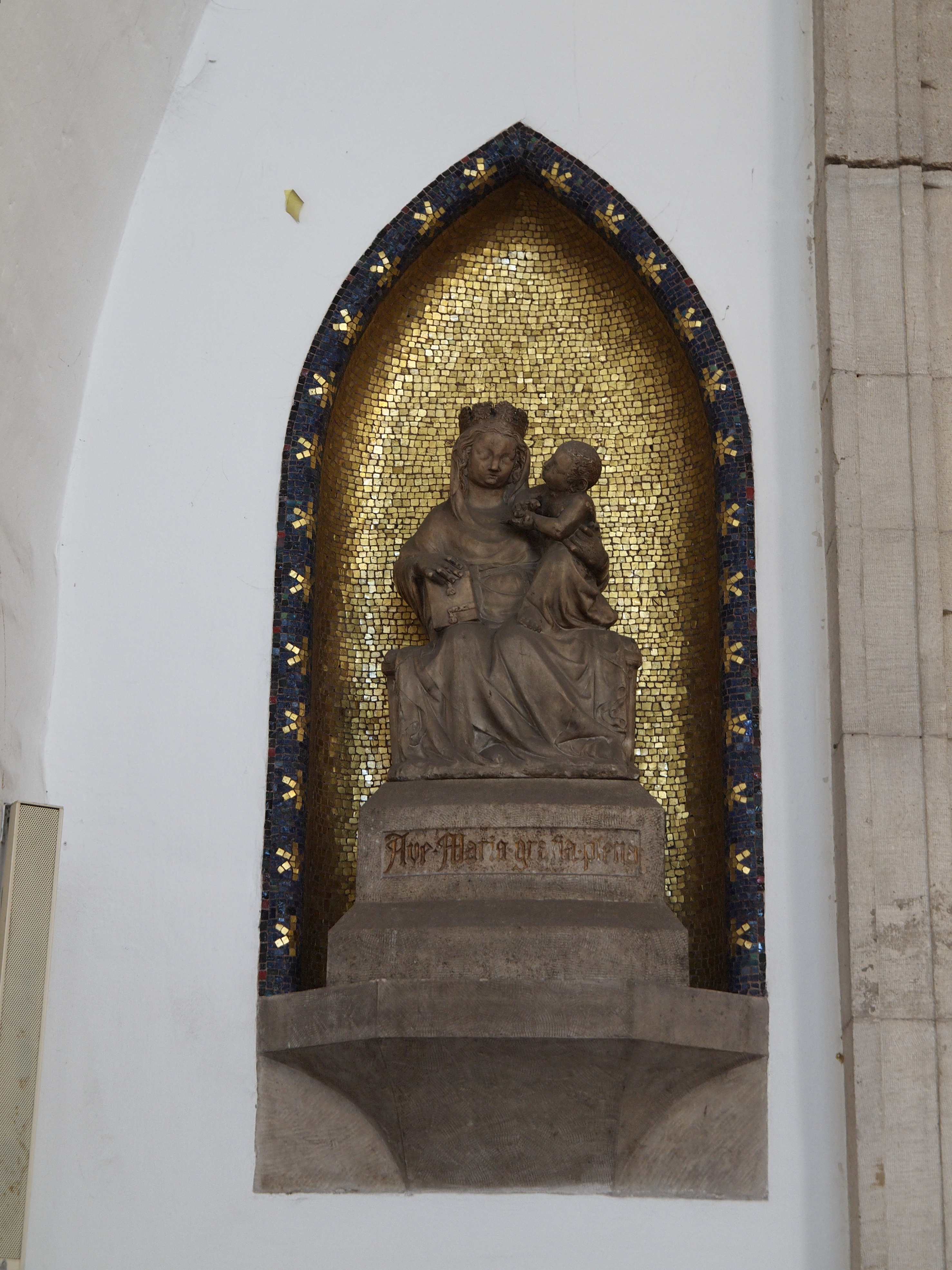 Sculptur Maria mit Kind in der Vorhalle im Turm im Dom in Aachen, Denkmal